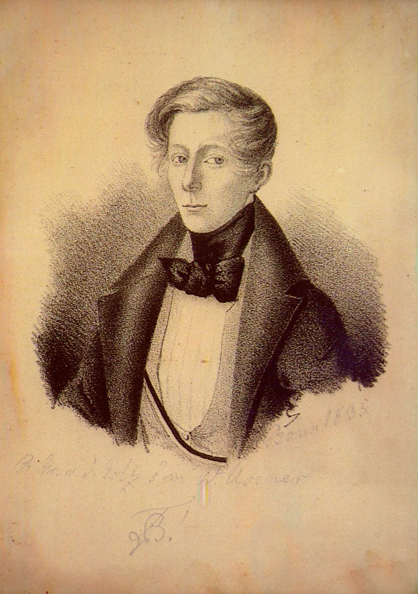 Lithographie von Robert von der Goltz